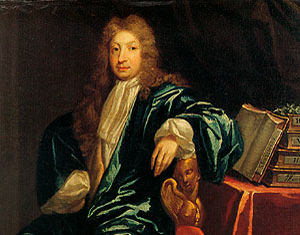 جون درايدن.